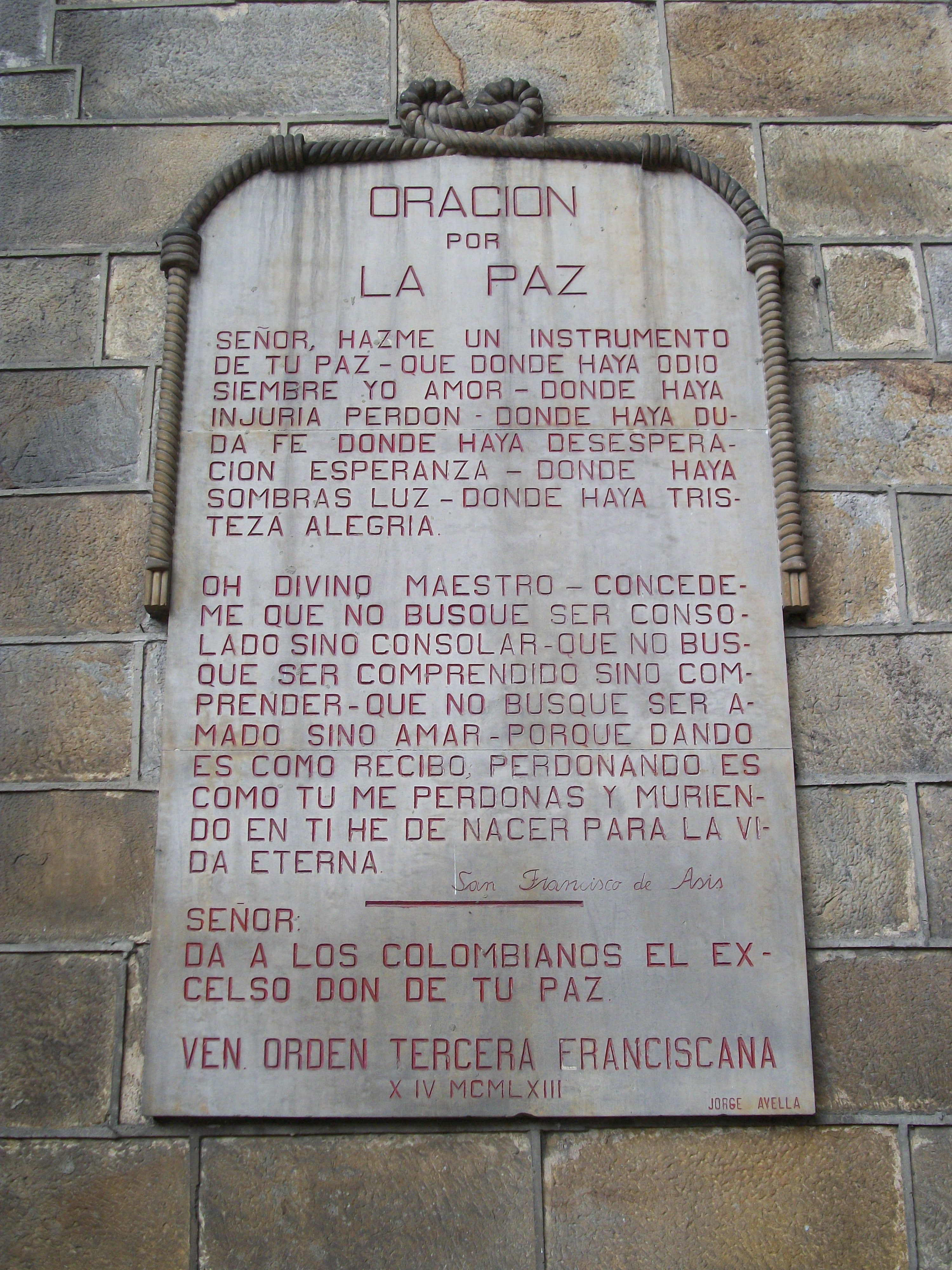 Placa con la Oración por la paz, de san Francisco, al lado de la iglesia La Tercera, en la cra 7 con clle 16 en Bogotá.